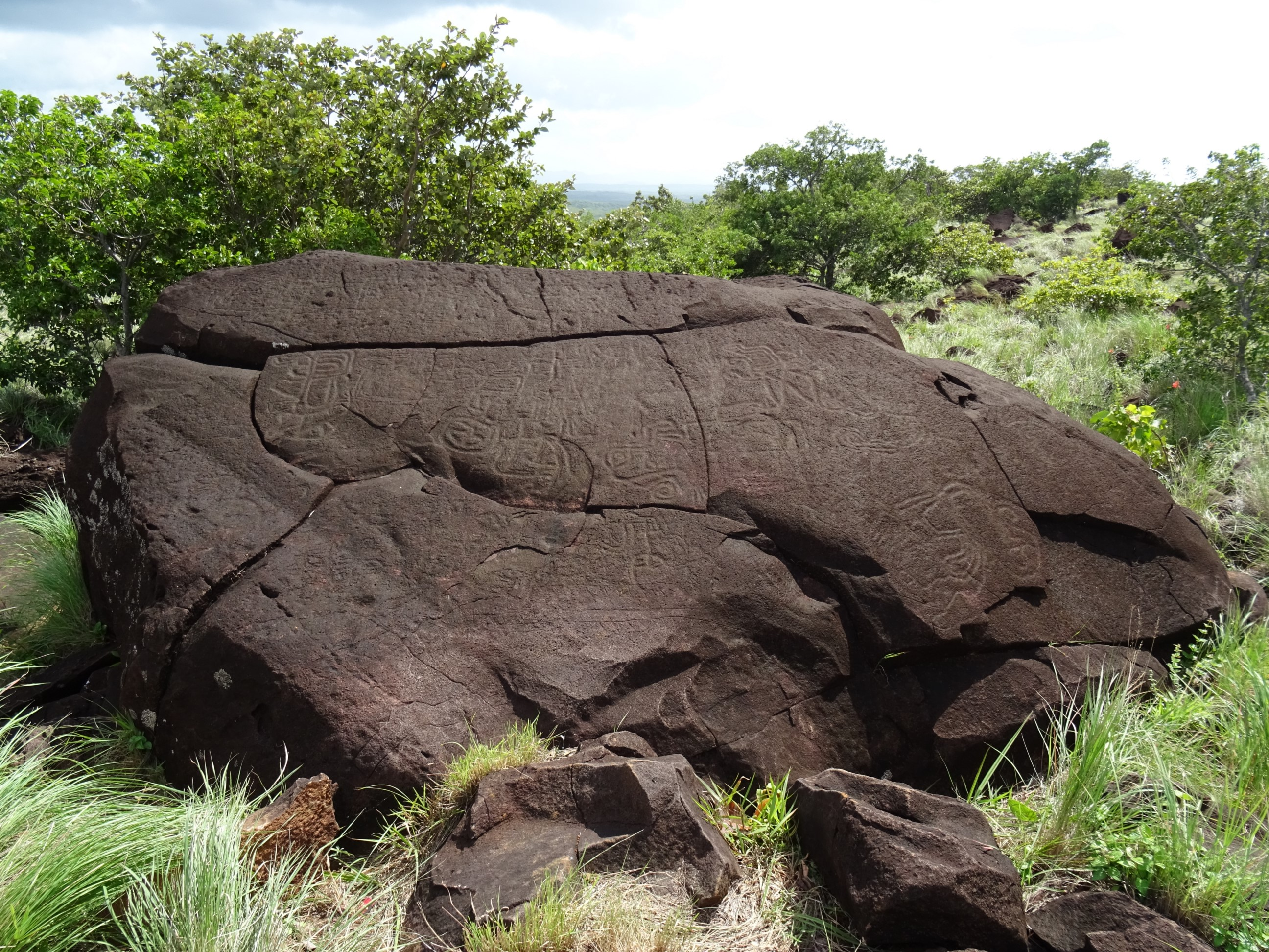 Roca 1001 en el Pedregal